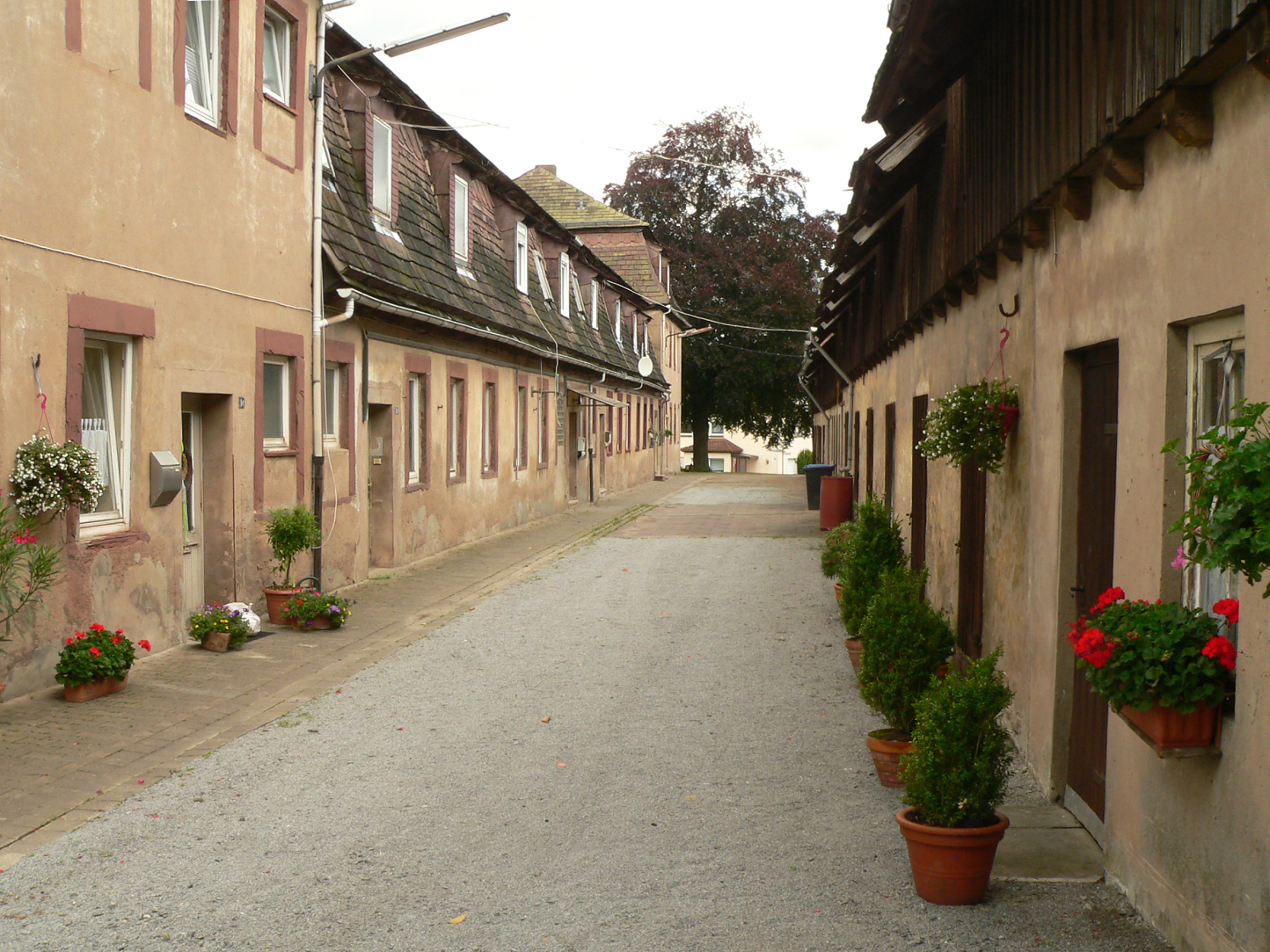 Werkswohnungen in der Von Langen Reihe der Porzellanmanufaktur Fürstenberg, rechts Wirtschaftsgebäude